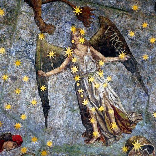 Bóveda de las escuelas menores de la Universidad de Salamanca. Virgo.